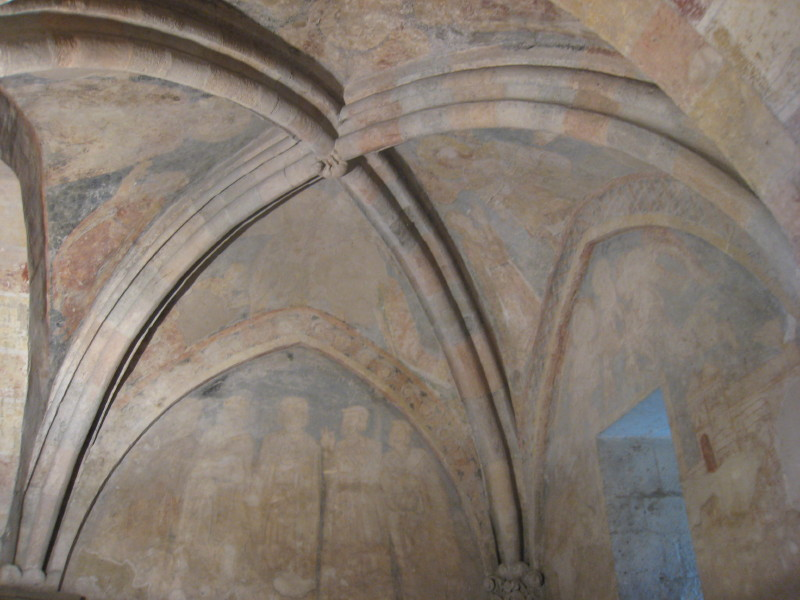 Cerkev sv. Jurija, Ják, Madžarska; freske pod korom.